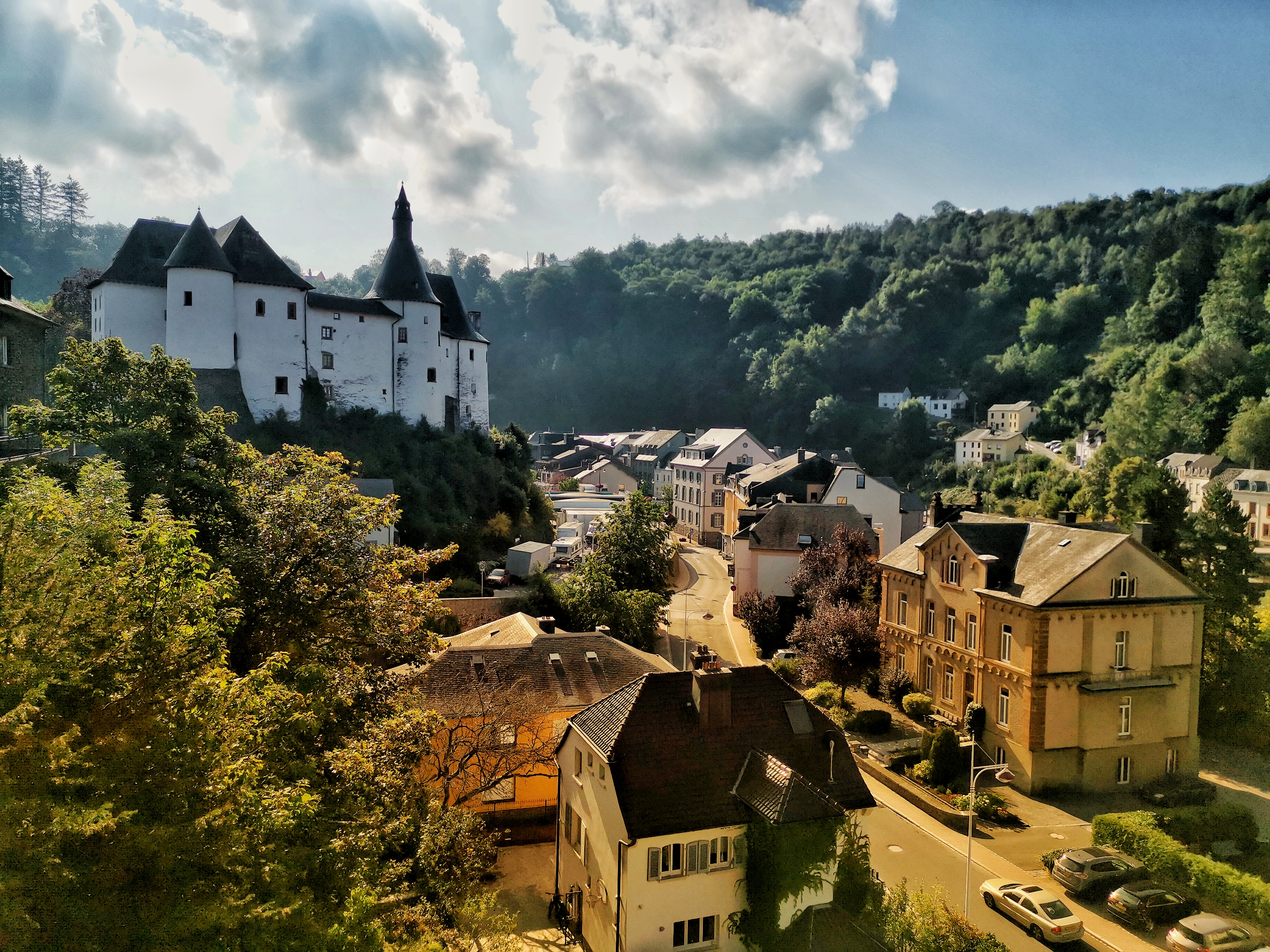 Clervaux, vue depuis la Montée de l'Égilse sur le Château de et la ville de Clervaux.